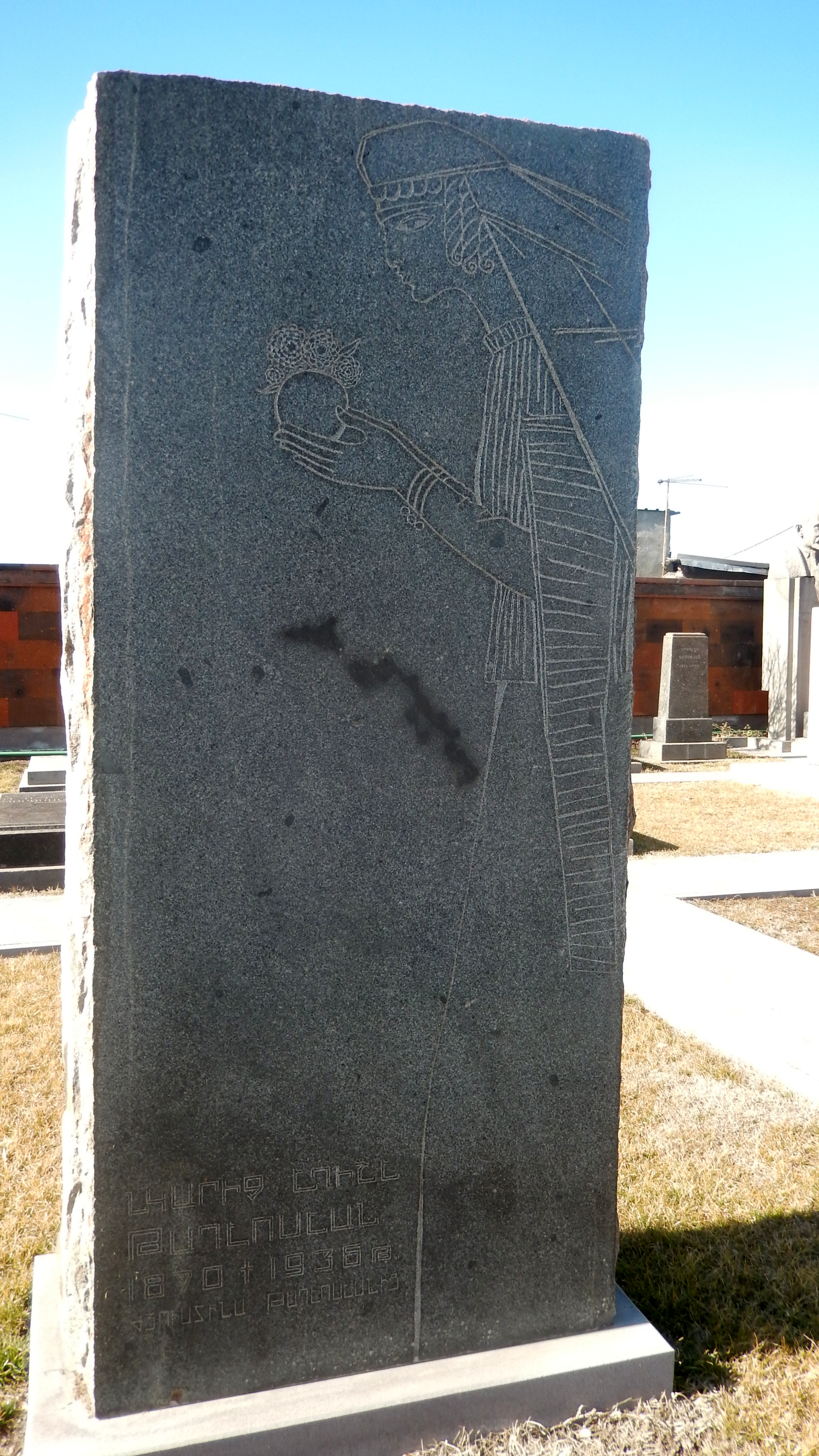 Եղիշե Թոդևոսյանի գերեզմանը 11/19